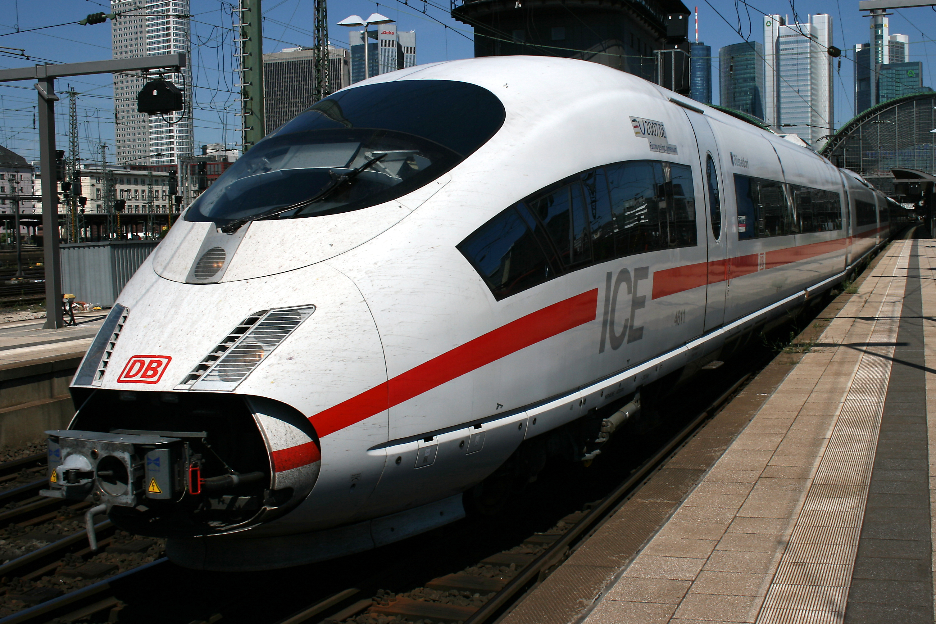 Der 406 011-6 der Baureihe 406 mit geöffneten Bugklappen im Frankfurter Hauptbahnhof